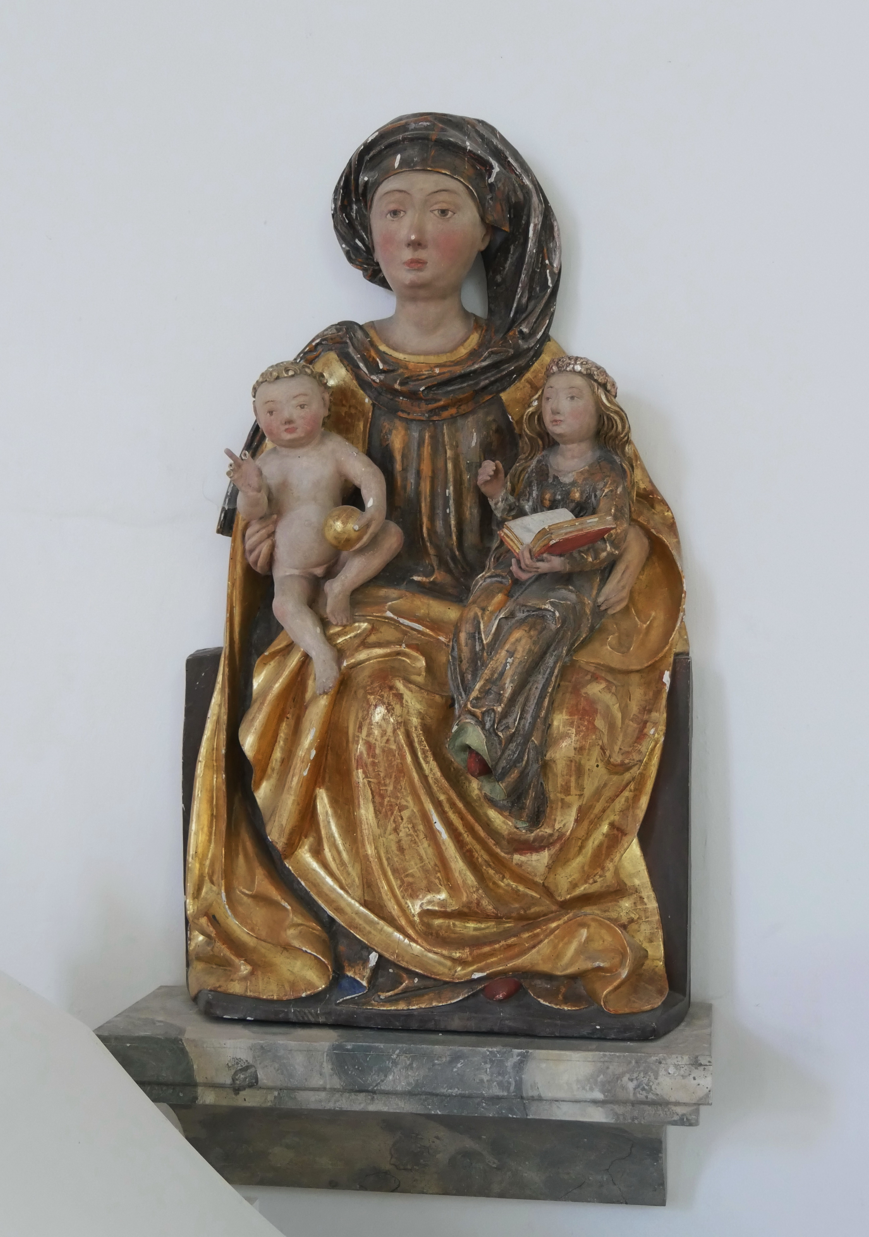 Dießen am Ammersee, Ortsteil Romenthal, Kapelle St. Anna. In der Figurengruppe der Hl. Anna-Selbdritt-Statue hält die Hl. Anna wie eine Mutter mit beiden Armen auf ihrem Schoß die kleine Maria (mit Buch) und das Jesuskind (mit Weltkugel)